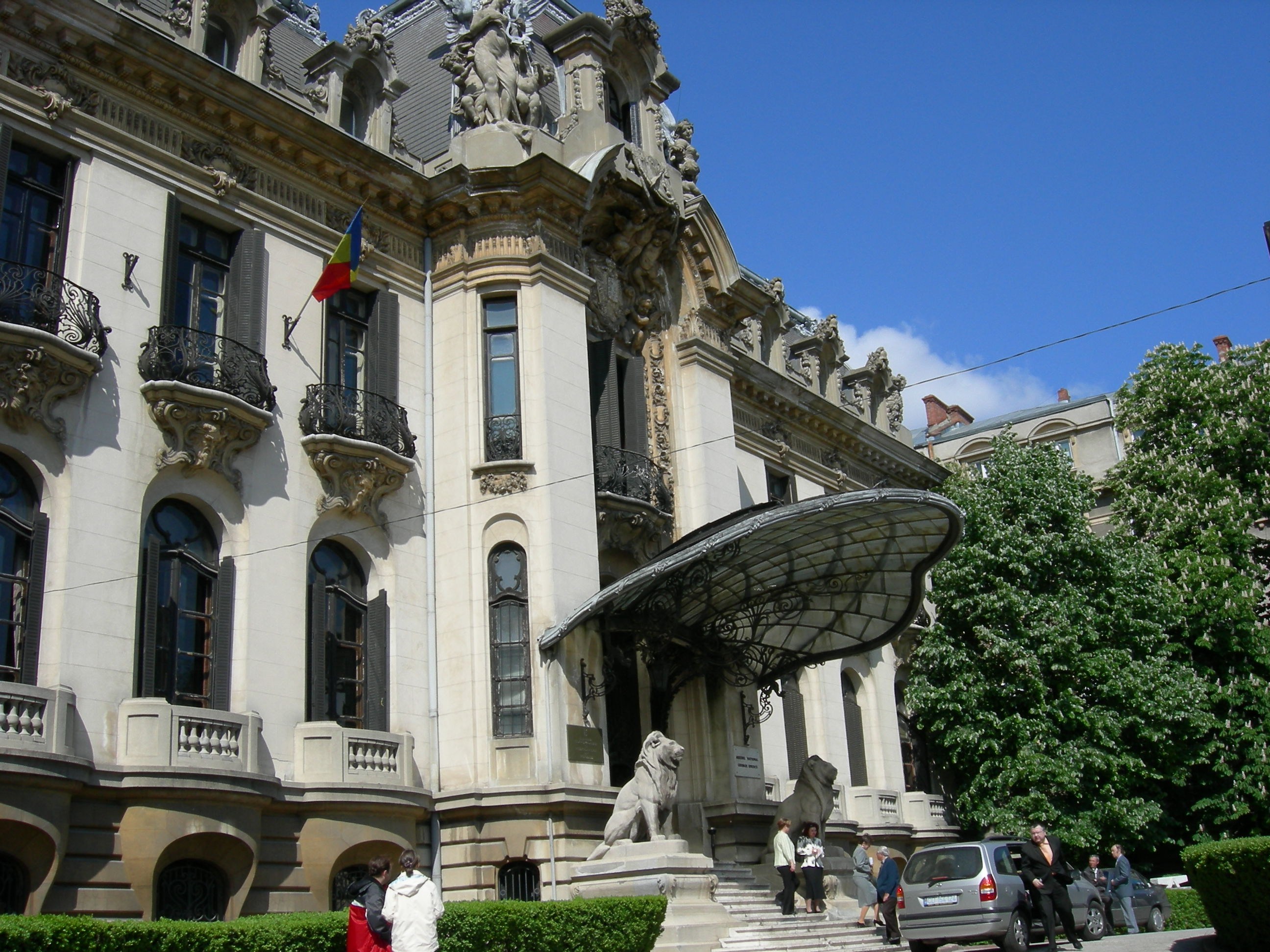 George Enescu Museum (Cantacuzino Palace), Calea Victoriei, Bucharest, Romania